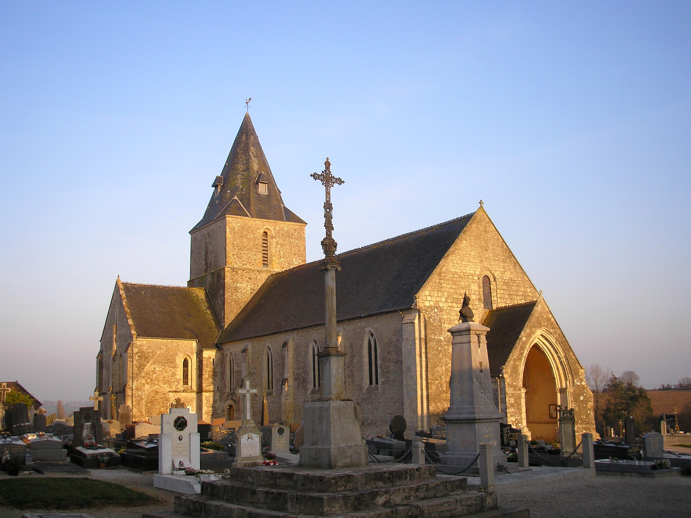 Montmartin-en-Graignes (Normandie, France). L'église Saint-Martin.